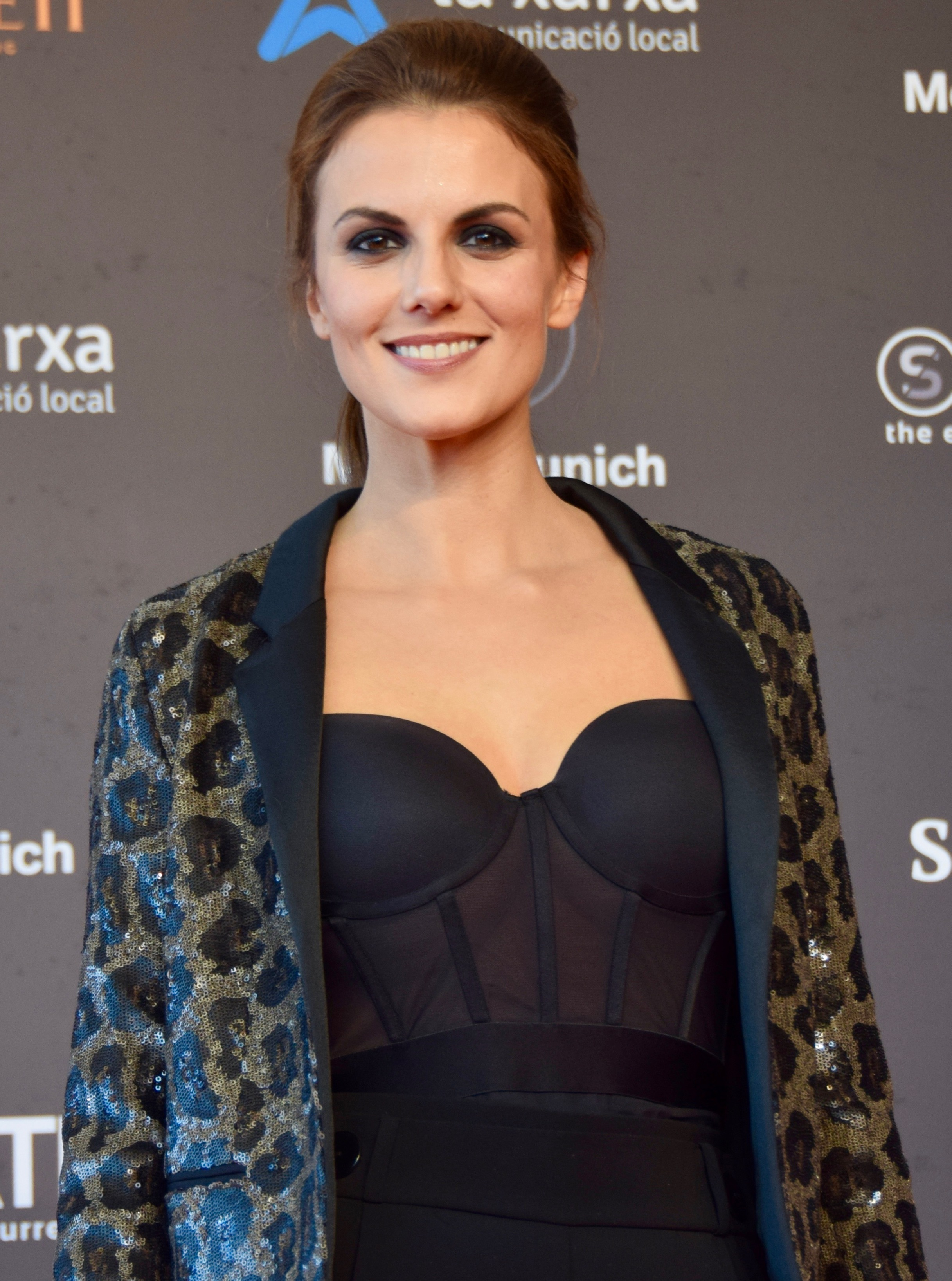 Festival de cinema de Sitges 2018